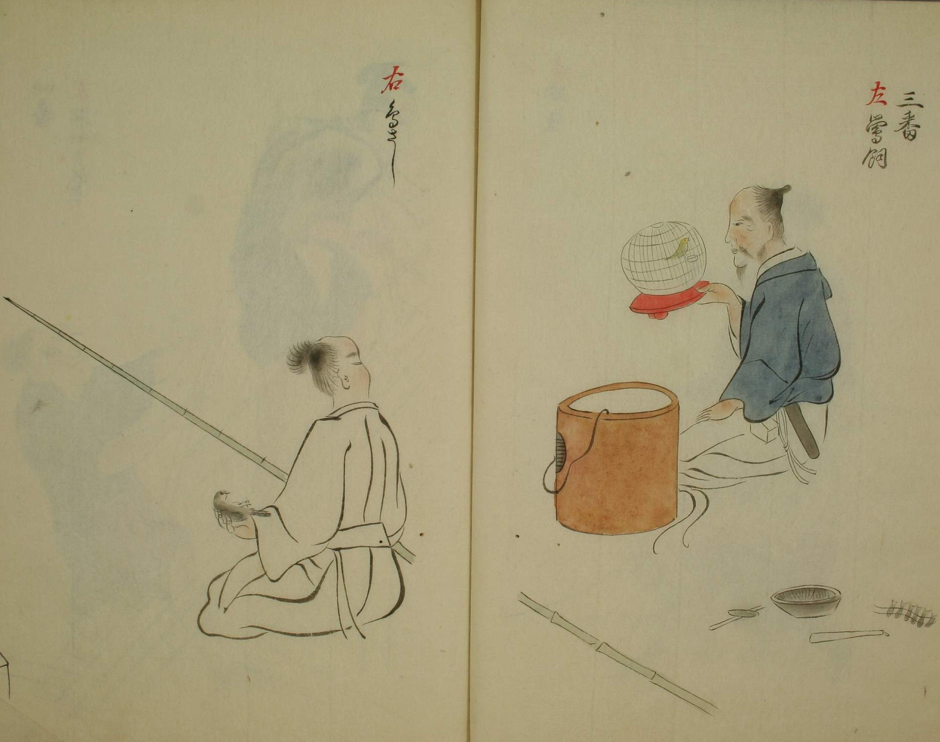 三十二番職人歌合』、垂恵 (?)、1494年、その1838年模写